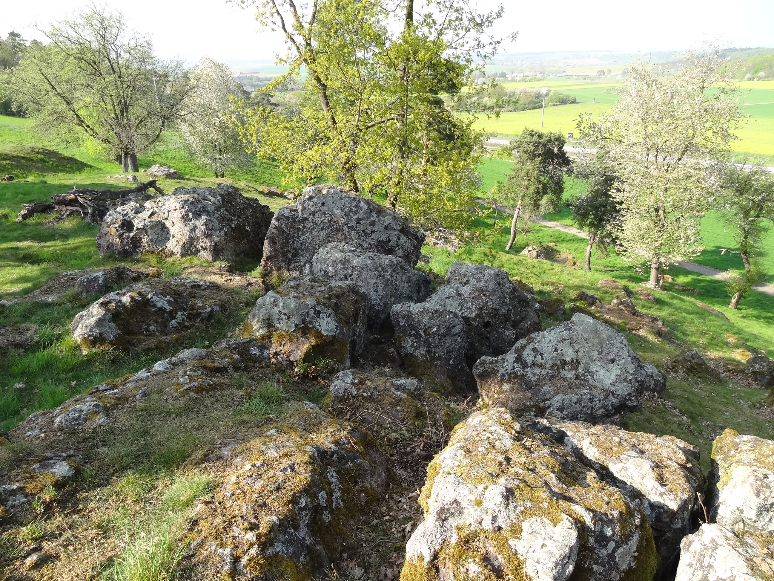 Traiser Steinberg